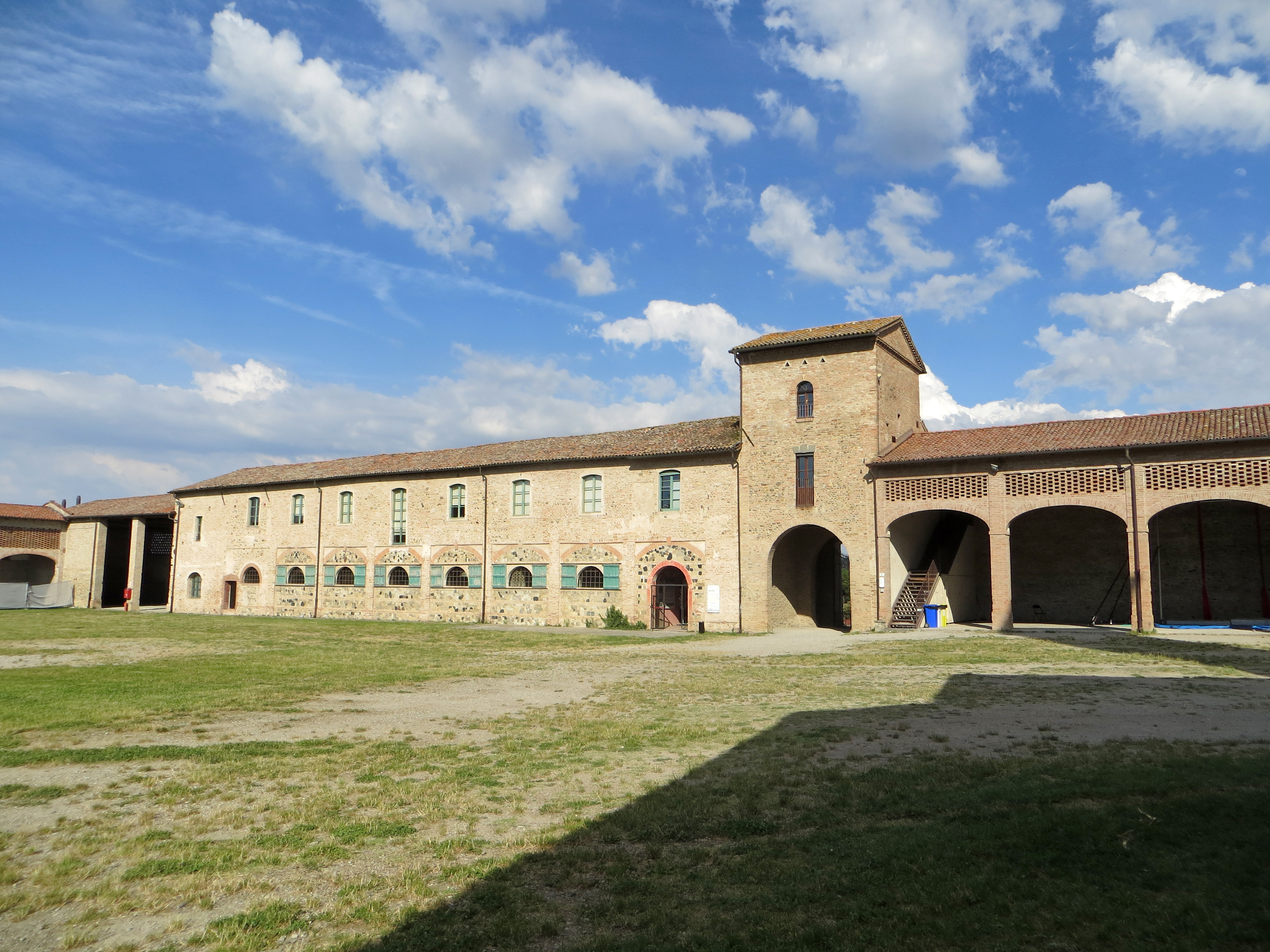 Corte di Giarola (Collecchio) - ala est